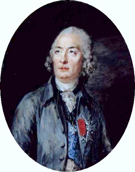 portrait